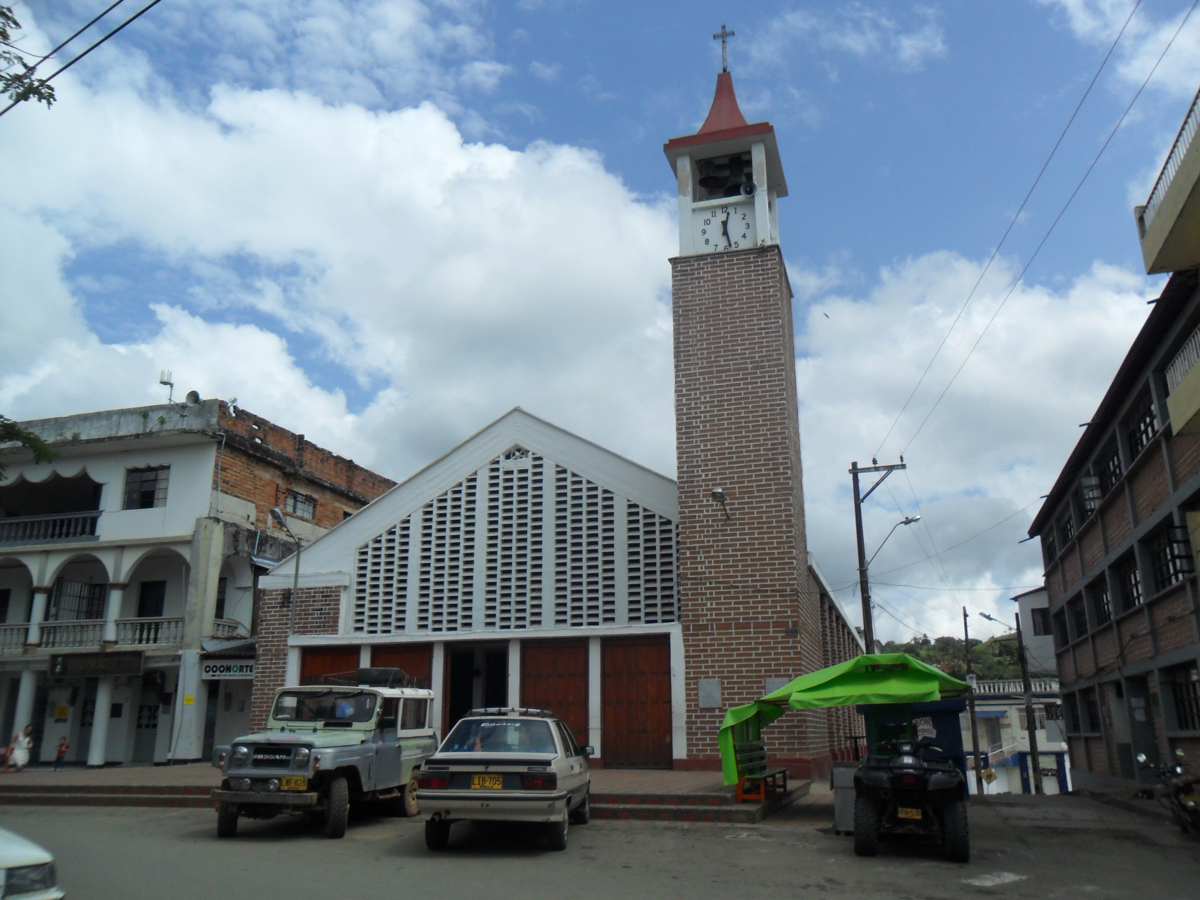 Vista de la fachada de la iglesia de Maceo, Antioquia